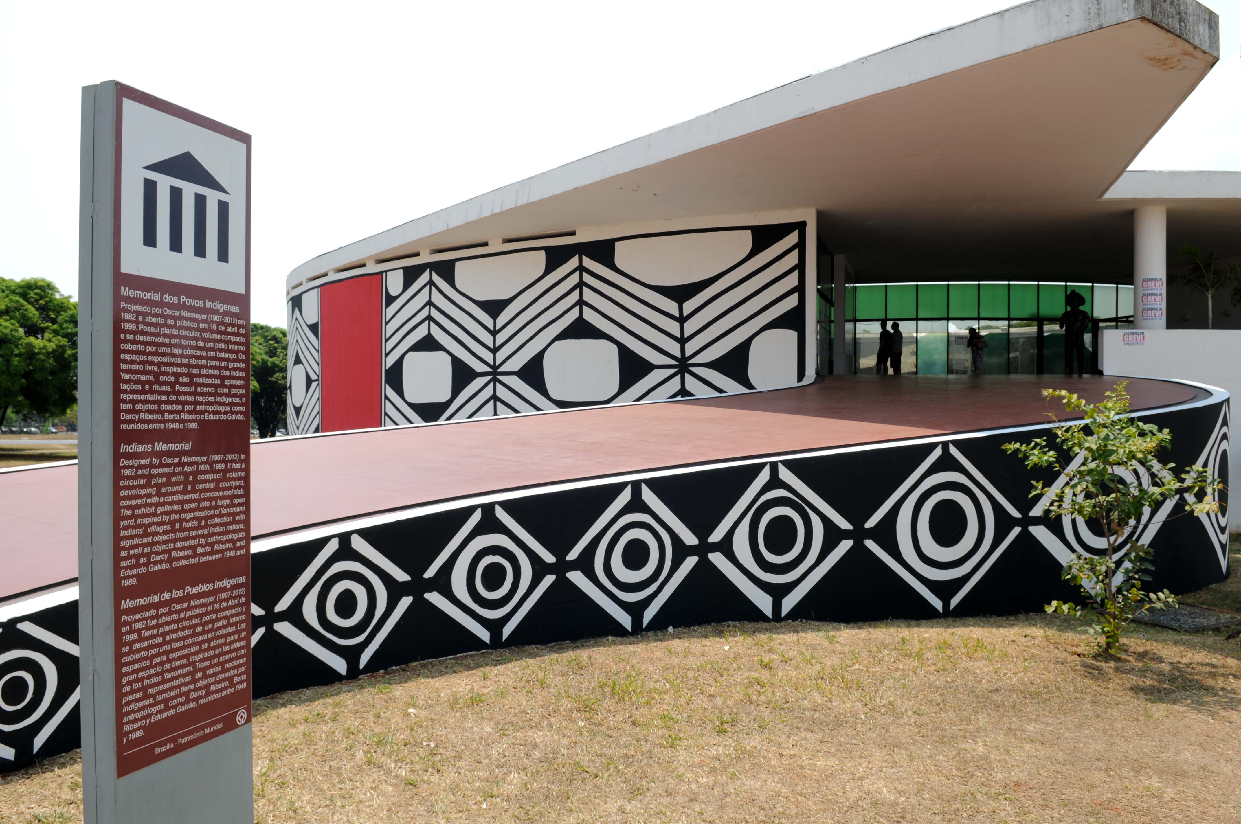 Brasília, DF, Brasil, 22/10/2015 Foto: Dênio Simões/Agência Brasília O lado externo Memorial dos Povos Indígenas, no Eixo Monumental, está coberto com grafismos tradicionais de aldeias do Parque Nacional do Xingu, em Mato Grosso. A intervenção faz parte do Moitará, programa de trocas culturais que exalta as matrizes indígenas do País, a ser lançado pela Fundação Nacional de Artes (Funarte) na segunda-feira (26), às 19 horas. Leia a matéria no site da Agência Brasília: bit.ly/1N0xeZK